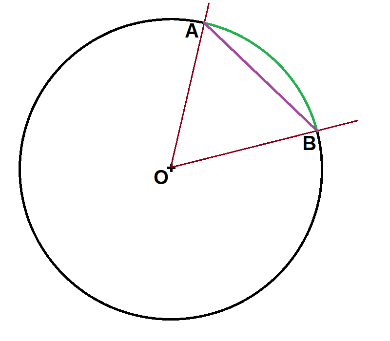 Représentation d'un cercle avec un arc et la corde correspondante.